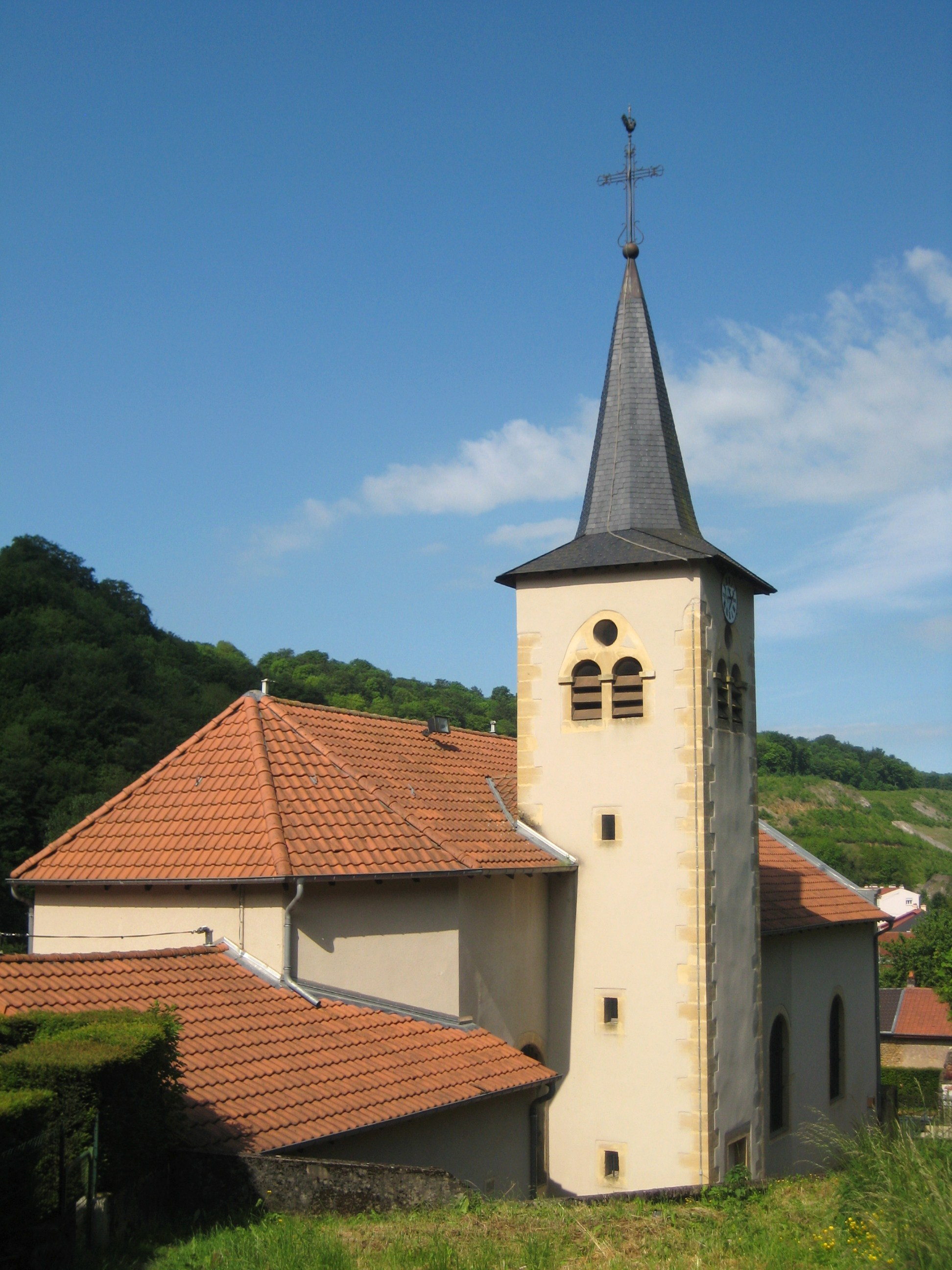 Description Église Saint-Pierre de Moyeuvre Petite Date22 May 2009Sourcemon appareil photoAuthorAimelaime Église Saint-Pierre de Moyeuvre Petite